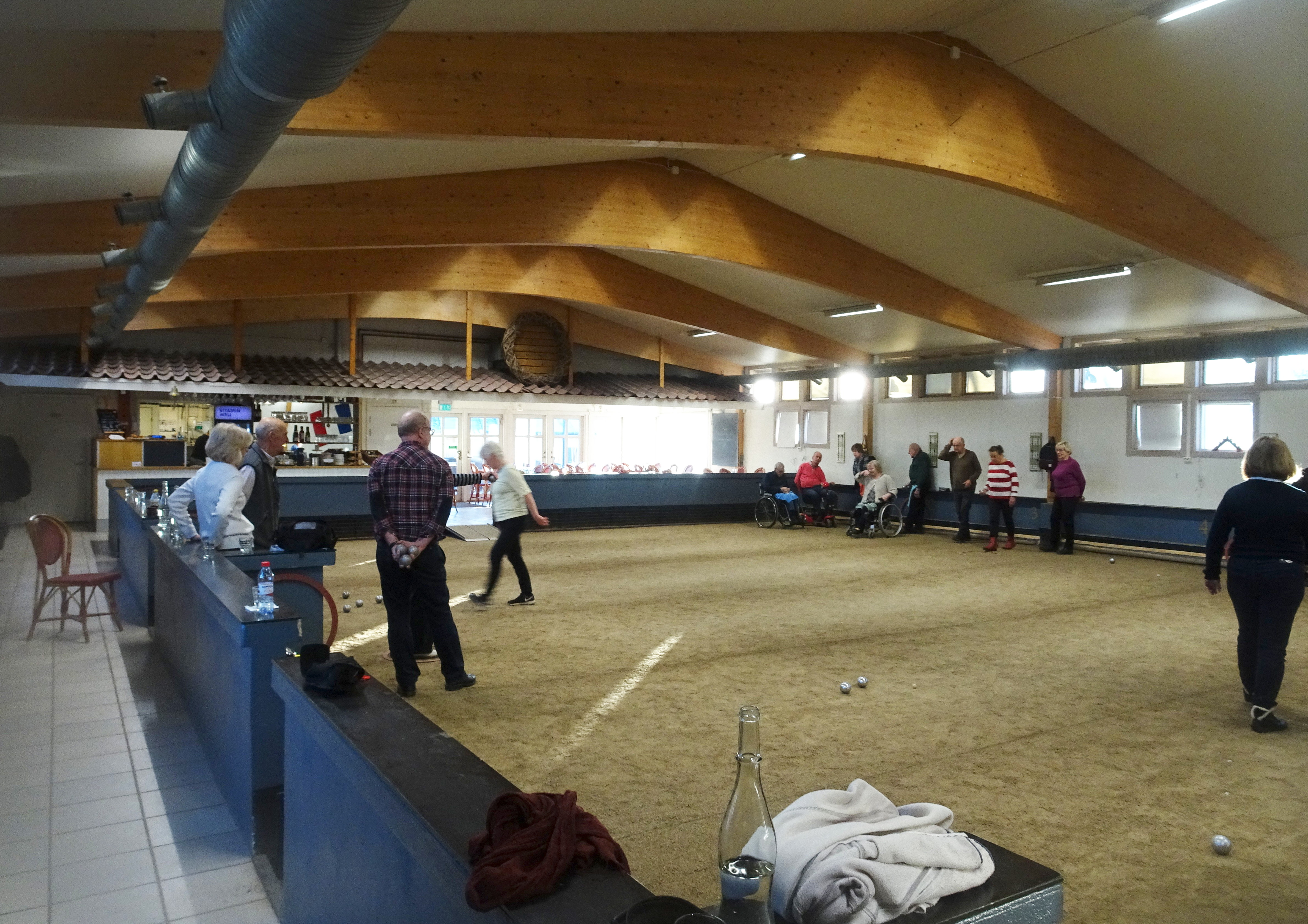 Prins Bertils Boulehall på Rosendal, Djurgården, Stockholm